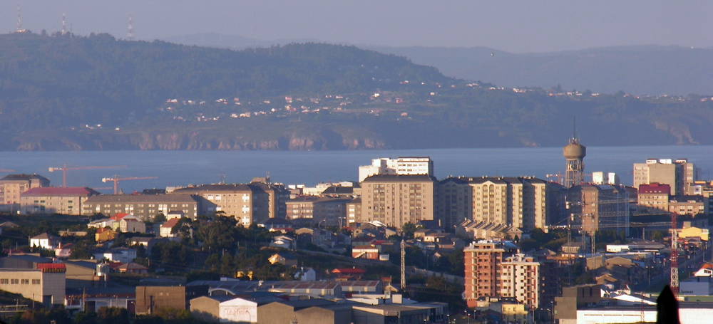 Imaxe tirada desde Pastoriza, Arteixo, Arteixo na cal pódese ver a parroquia de San Cristovo das Viñas, en concreto, os lugares da Silva, A Moura e O Ventorrillo. Ata se pode ver Montefaro, Cervás, Ares ó outro lado da ría. Provincia da Coruña, Galiza .